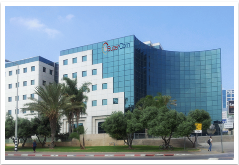 Alvarion building in Herzliya